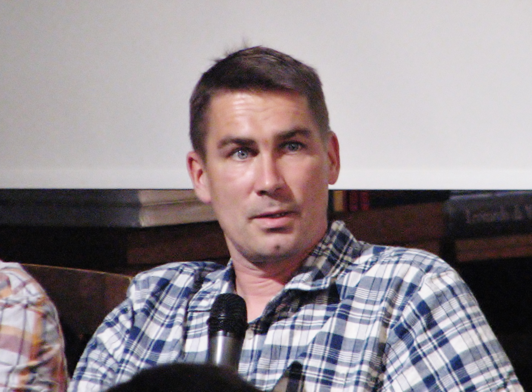 Priit Kuusk Uhhuduuri raamatu "Sina ei muuda Aafrikat, Aafrika muudab sind" esitlusel